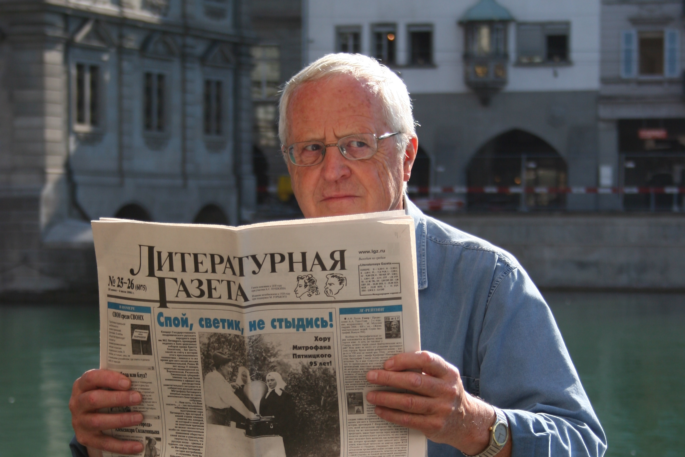 Peter Zeindler, schweizerischer Schriftsteller.